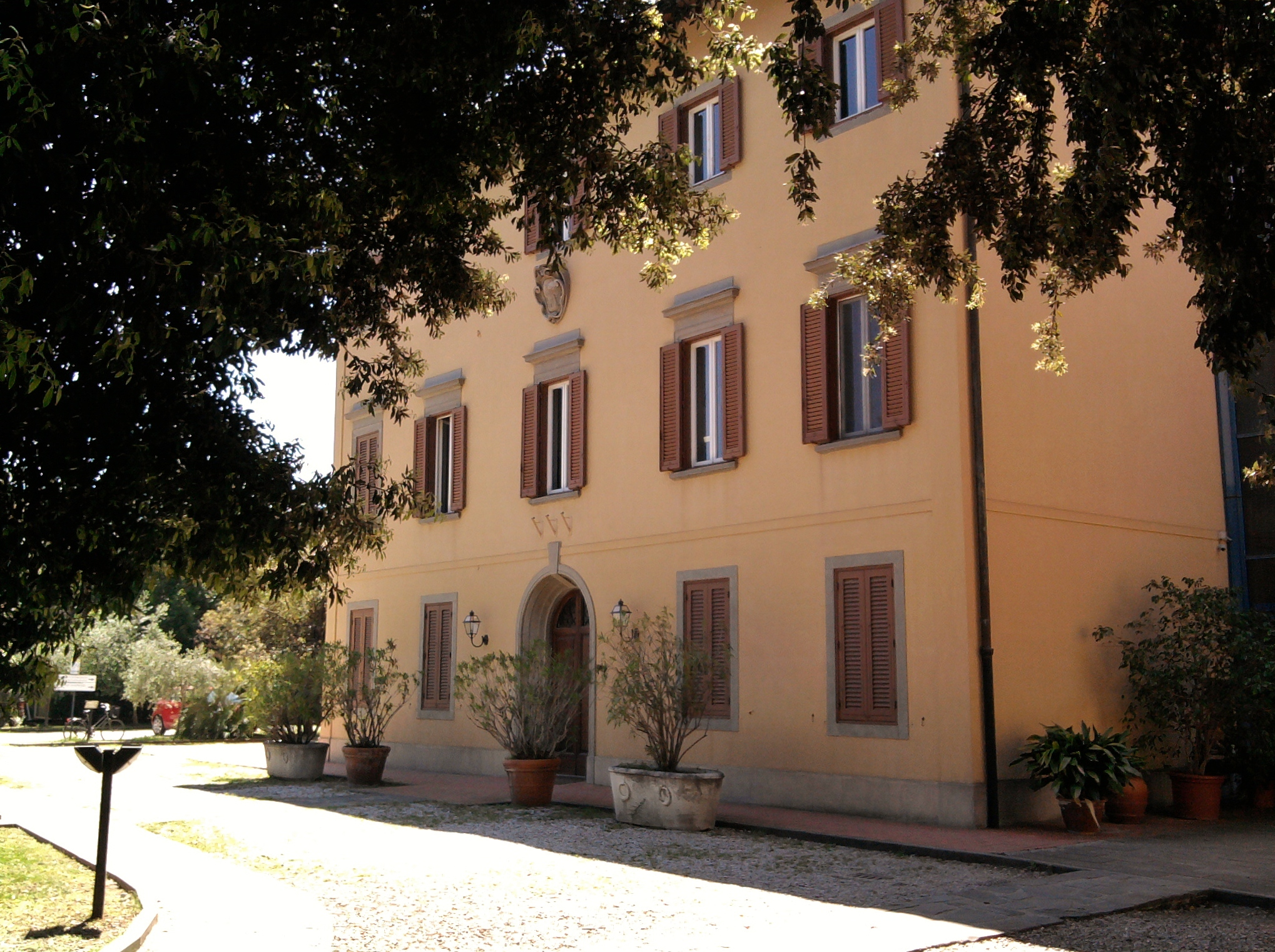 Livorno, Villa Henderson, sede del Museo di Storia Naturale del Mediterraneo.